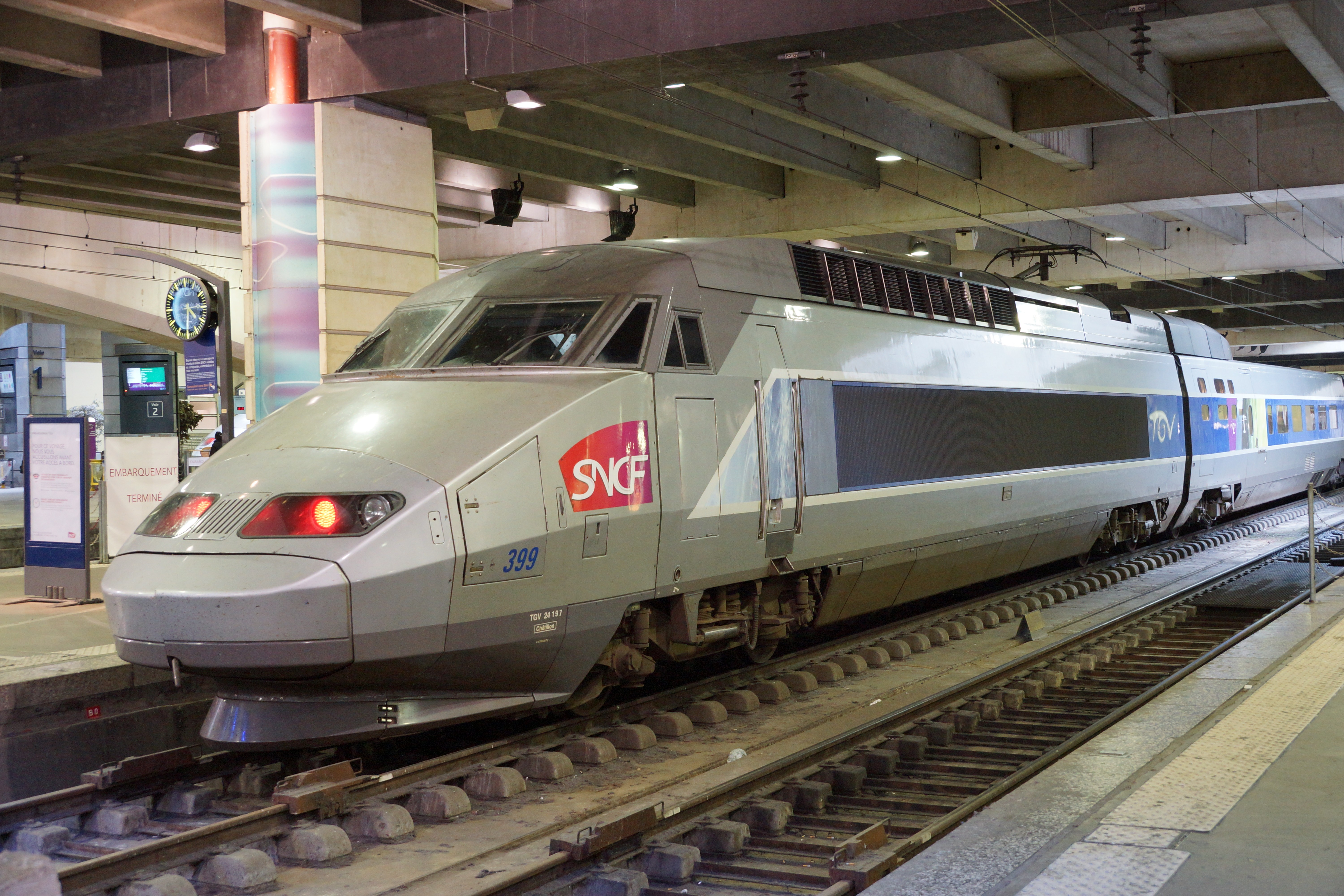 Gare Montparnasse, Paris, France.